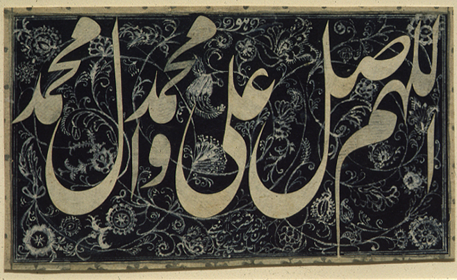 Panel by Shams ud-Din, Hyderabad, 1724-1748